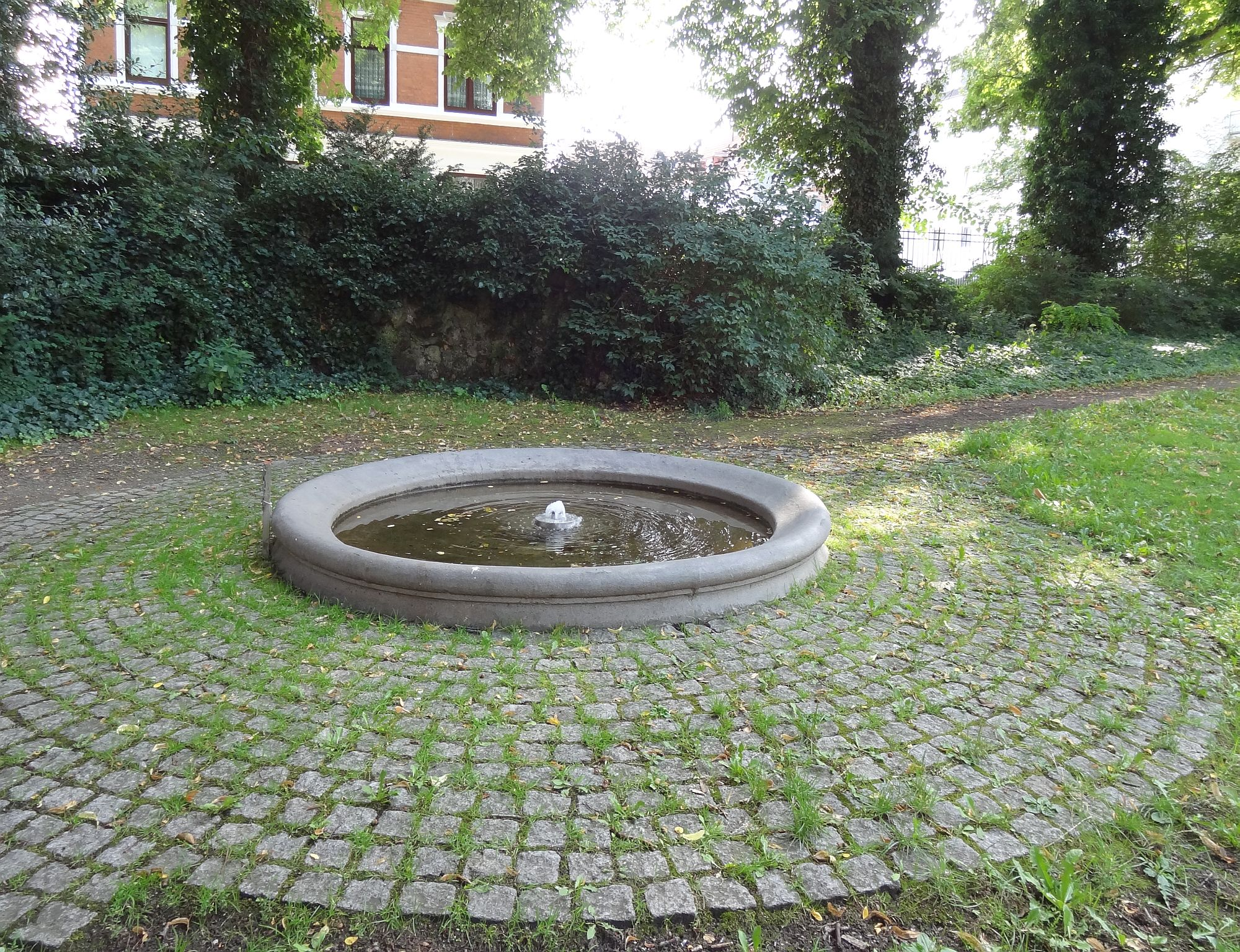 Brunnen im Wilkenspark in Bremen-Hemelingen